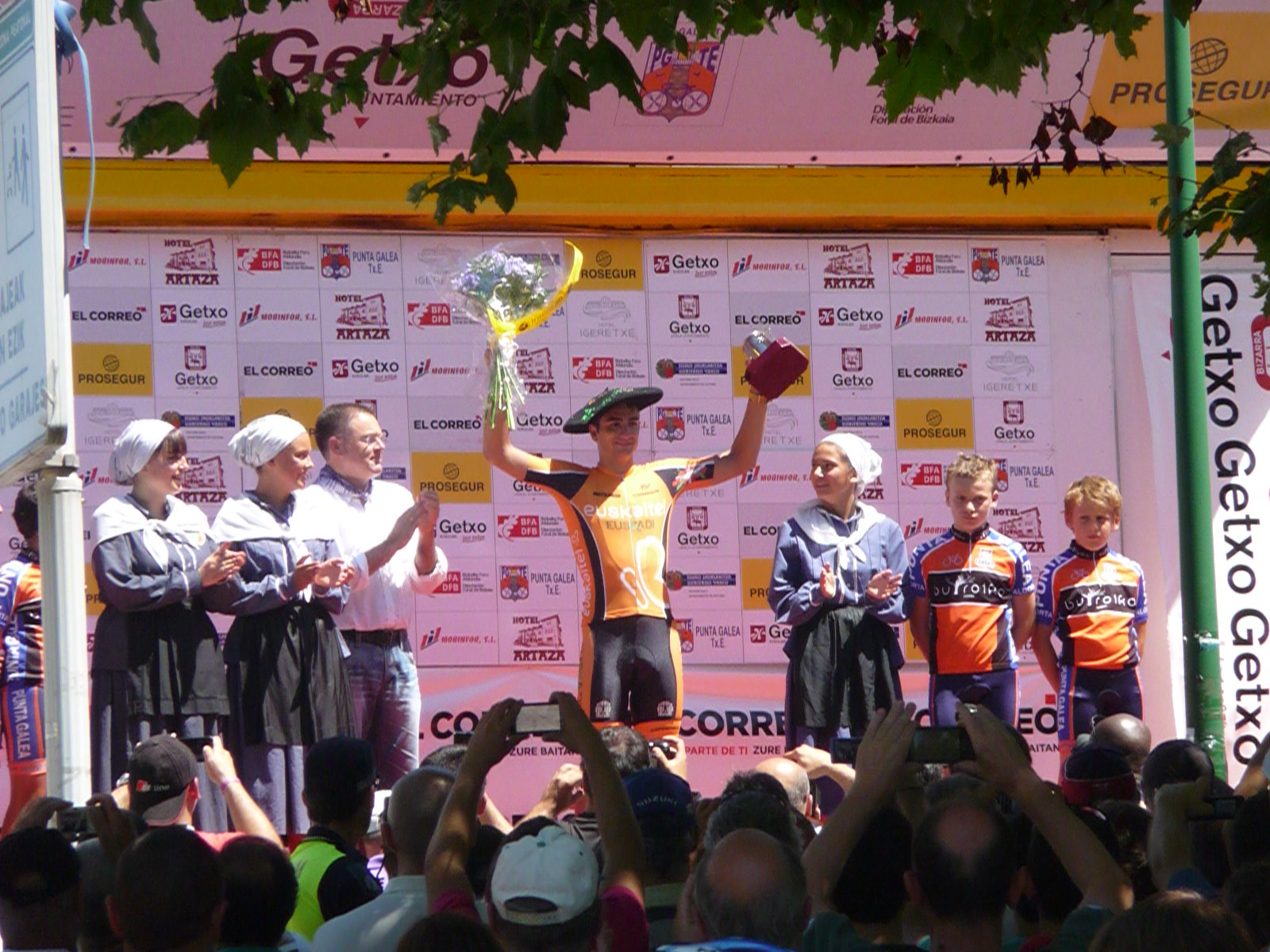 Lobato en el Circuito de Getxo 2013